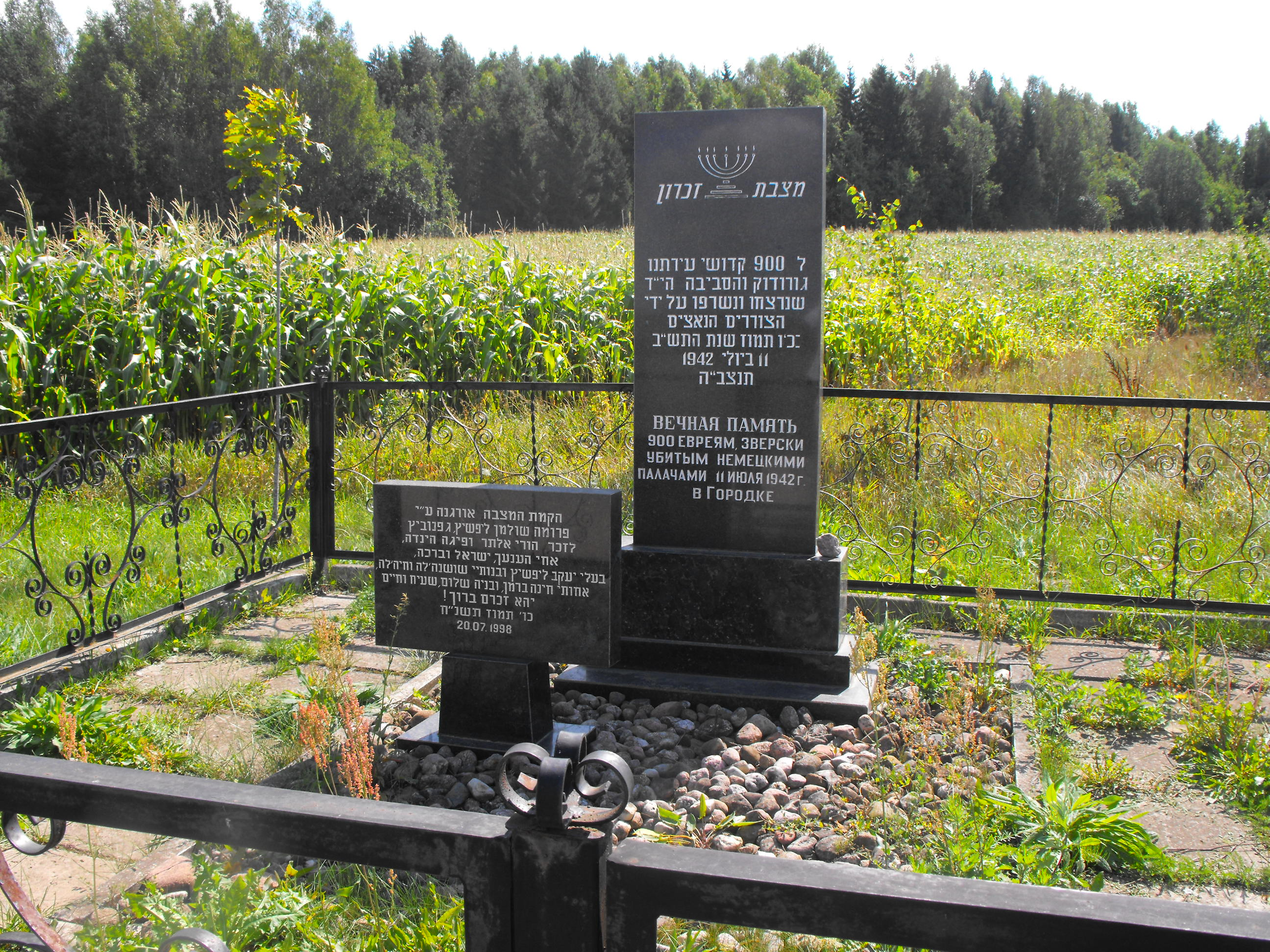 Памятник на месте массового убийства германскими нацистами и полицаями 900 евреев 11 июля 1942 года (720 человек из деревни Городок Молодечненского района и 180 - из близлежащих деревень). Евреев сожгли заживо в сарае на хуторе, расположенном в то время в 200-300 метров от памятника глубже от дороги. Памятник находится в 1,5 километрах по дороге, уходящей направо перед Городком со стороны Олехновичей (поворот на деревни Выдричи и Кухари Молодечненского района).